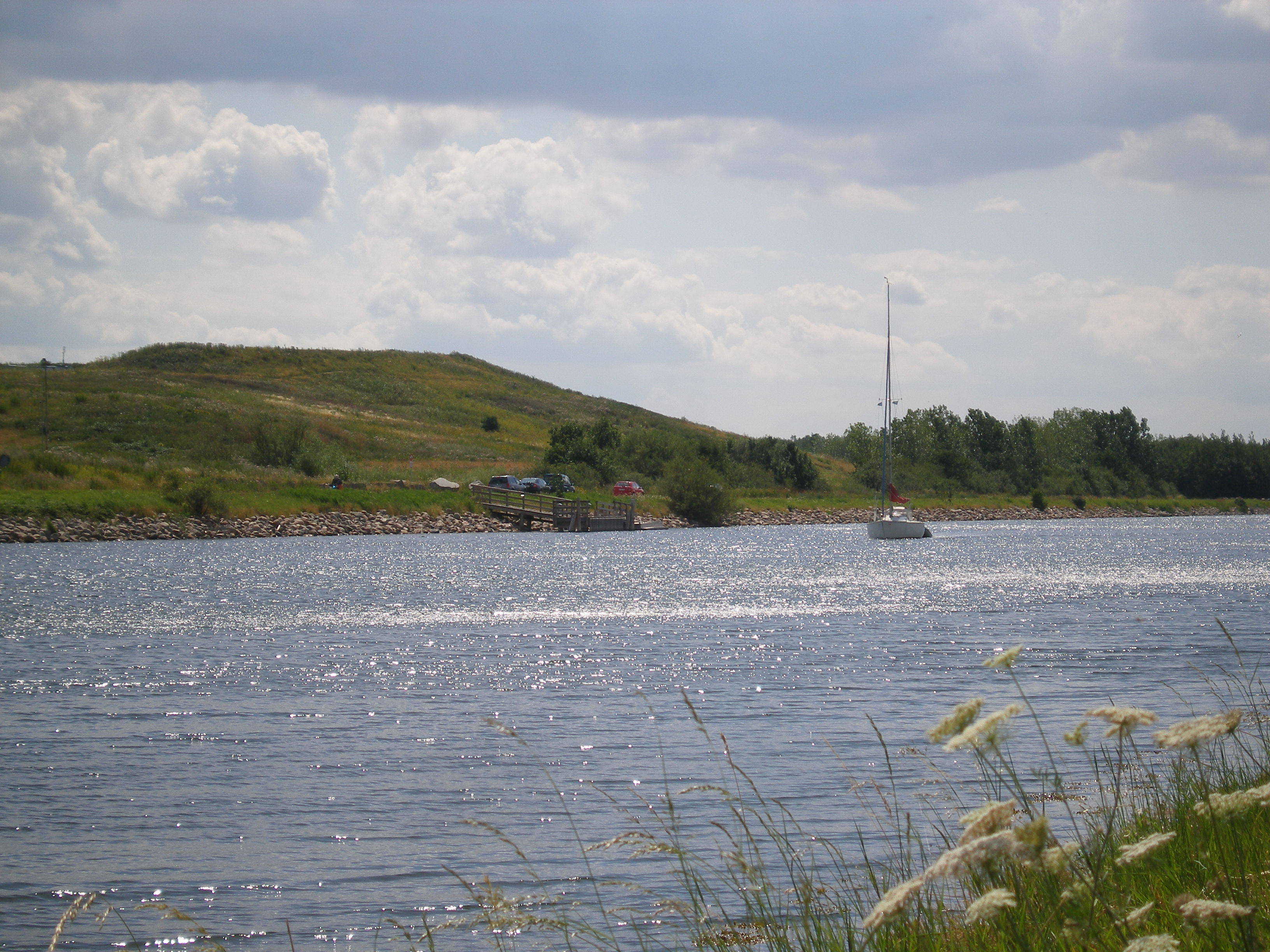 Odense Kanal udsigt mod Stige Ø